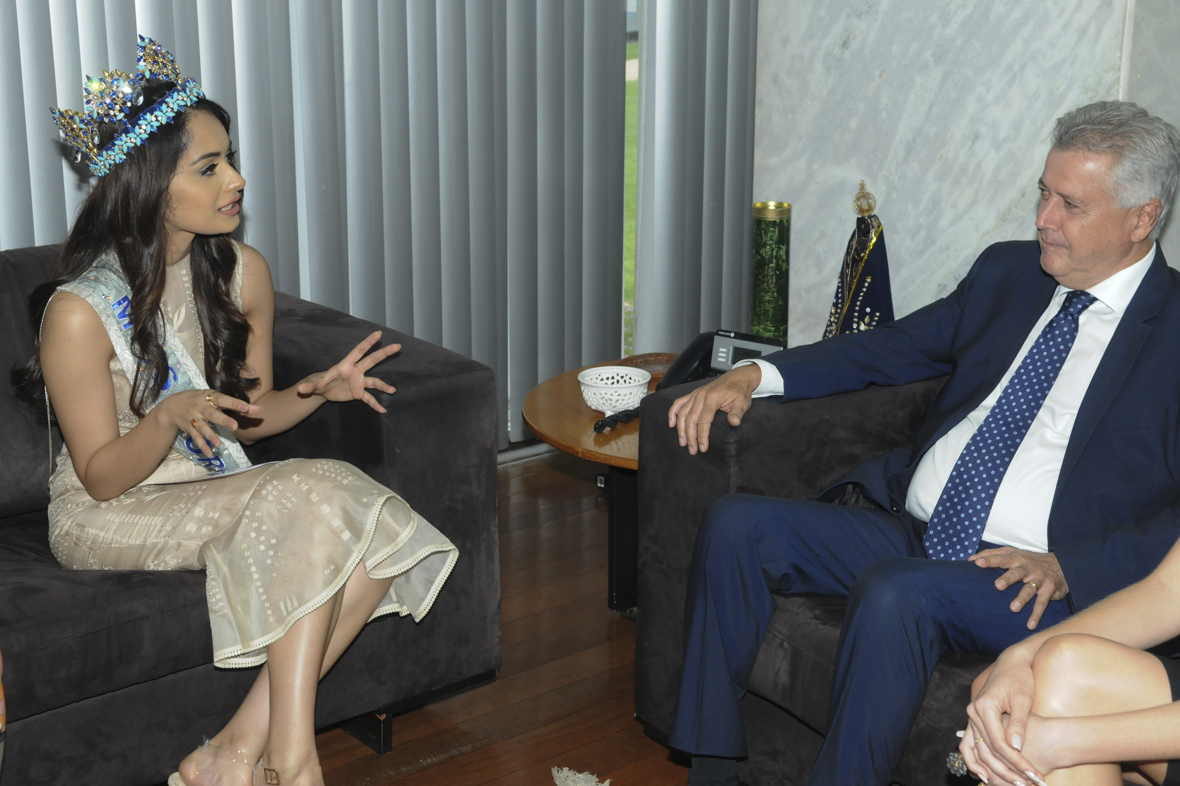 Palácio do Buriti, Brasília, DF, Brasil 16/4/2018 Foto: Renato Araújo/Agência Brasília. Em visita a Brasília para apoiar a Associação de Pais e Amigos dos Excepcionais do Distrito Federal (Apae-DF), a vencedora do concurso Miss Mundo de 2017, a indiana Manushi Chhillar, foi recebida pelo governador Rodrigo Rollemberg na tarde desta segunda-feira (16). No encontro, no Palácio do Buriti, ela apresentou ao governador questões ligadas à organização sem fins lucrativos, que atende pessoas com deficiência intelectual.